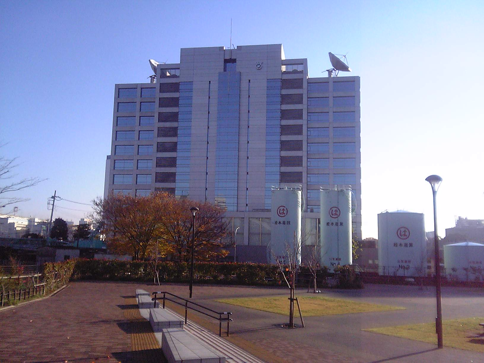 東京都品川区東品川3丁目にあるフジテレビ別館